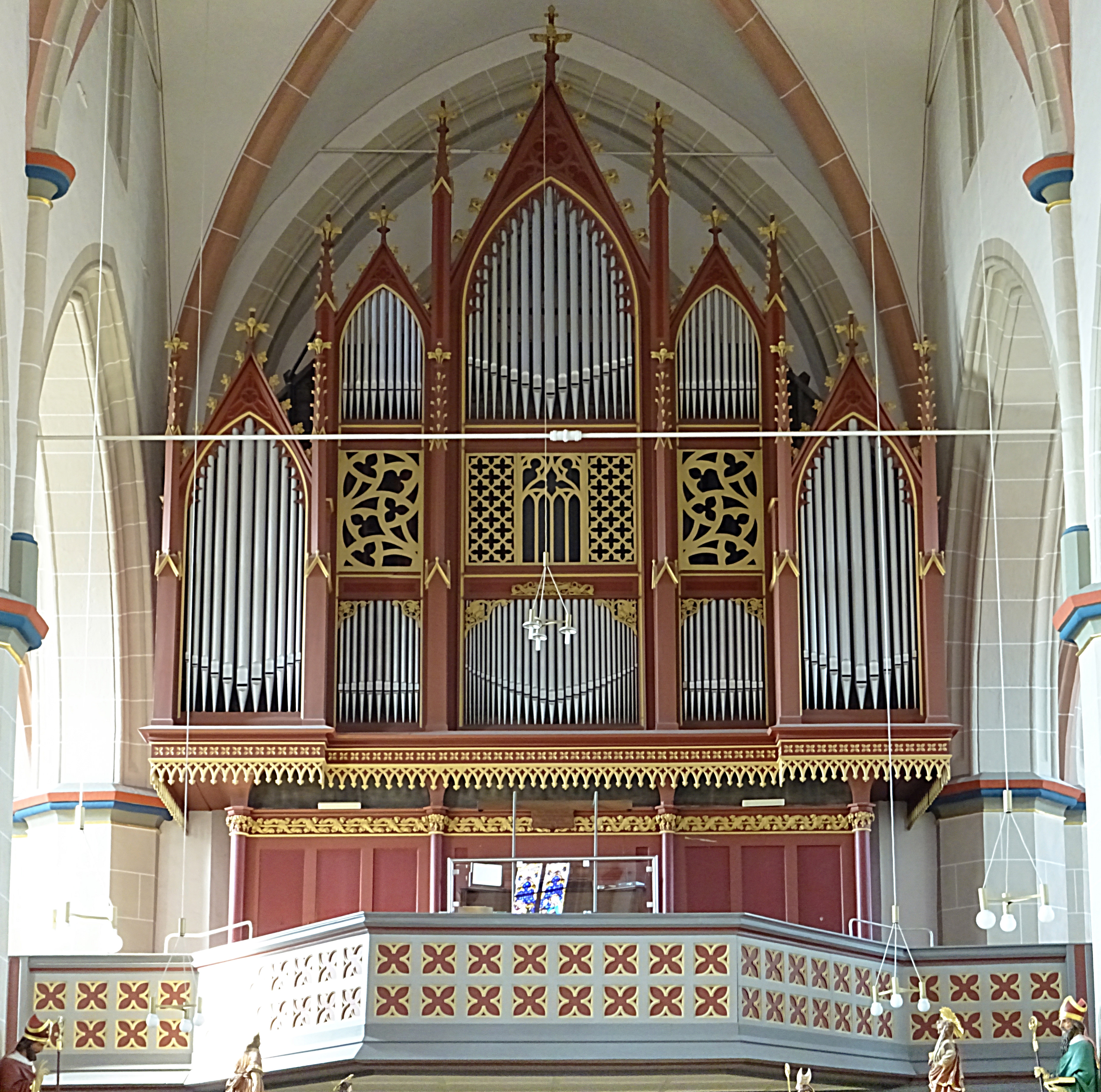 Orgel von Anton Feith (1933, IIIP/43) in der Pfarrkirche St. Gertrud (Dingelstädt)